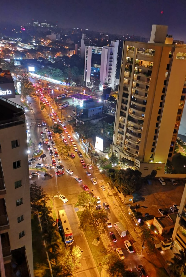 Avda. Santa Teresa, Asunción